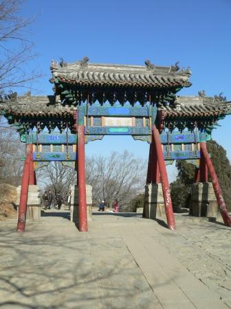 八大处宝珠洞牌坊